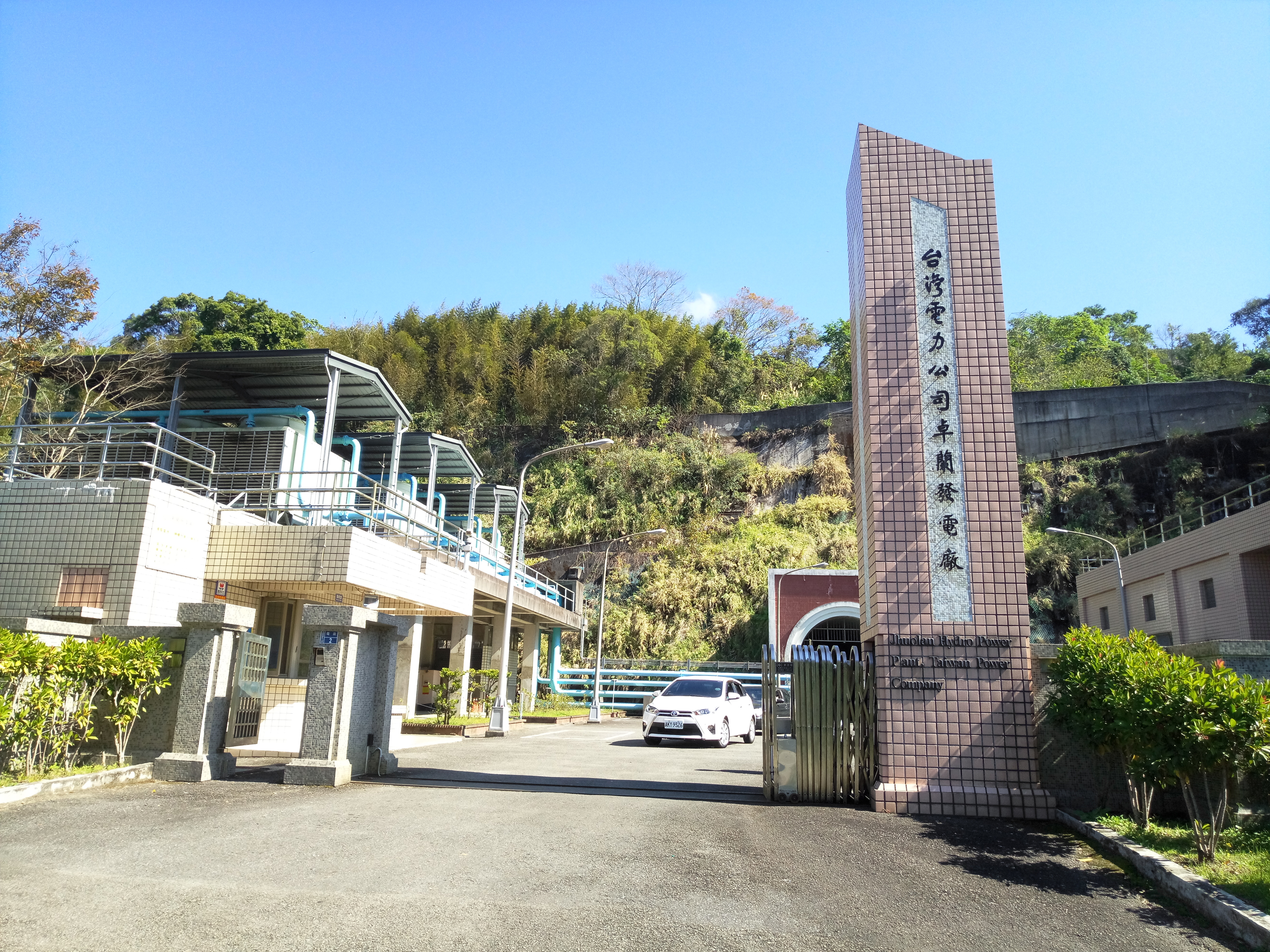 台電卓蘭發電廠大門。